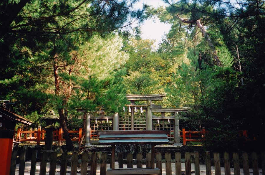 大神神社摂社。